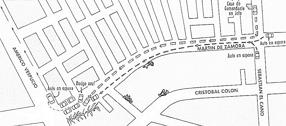 Para evitar la llegada de Salvador Allende a la presidencia de Chile, dos generales pagados por Estados Unidos, Roberto Viaux y Camilo Valenzuela (más un almirante en las sombras José Toribio Merino), junto a miembros de Patria y Libertad, planearon el secuestro del Comandante en Jefe del Ejército, René Schneider, con el fin de provocar la intervención de las fuerzas armadas y evitar la sesión del Congreso que aprobaría los resultados de la elección presidencial chilena. No sería el último jefe militar chileno en ser asesinado por el intento desestabilizador estadounidense. En las postrimerías del Terrorismrégimen de Allende asesinarían al Capitán de Navío Arturo Araya Peeters, edecán presidencial, para evitar que asumiera como Comandante en Jefe de la Armada, obstruyendo así a José Toribio Merino.